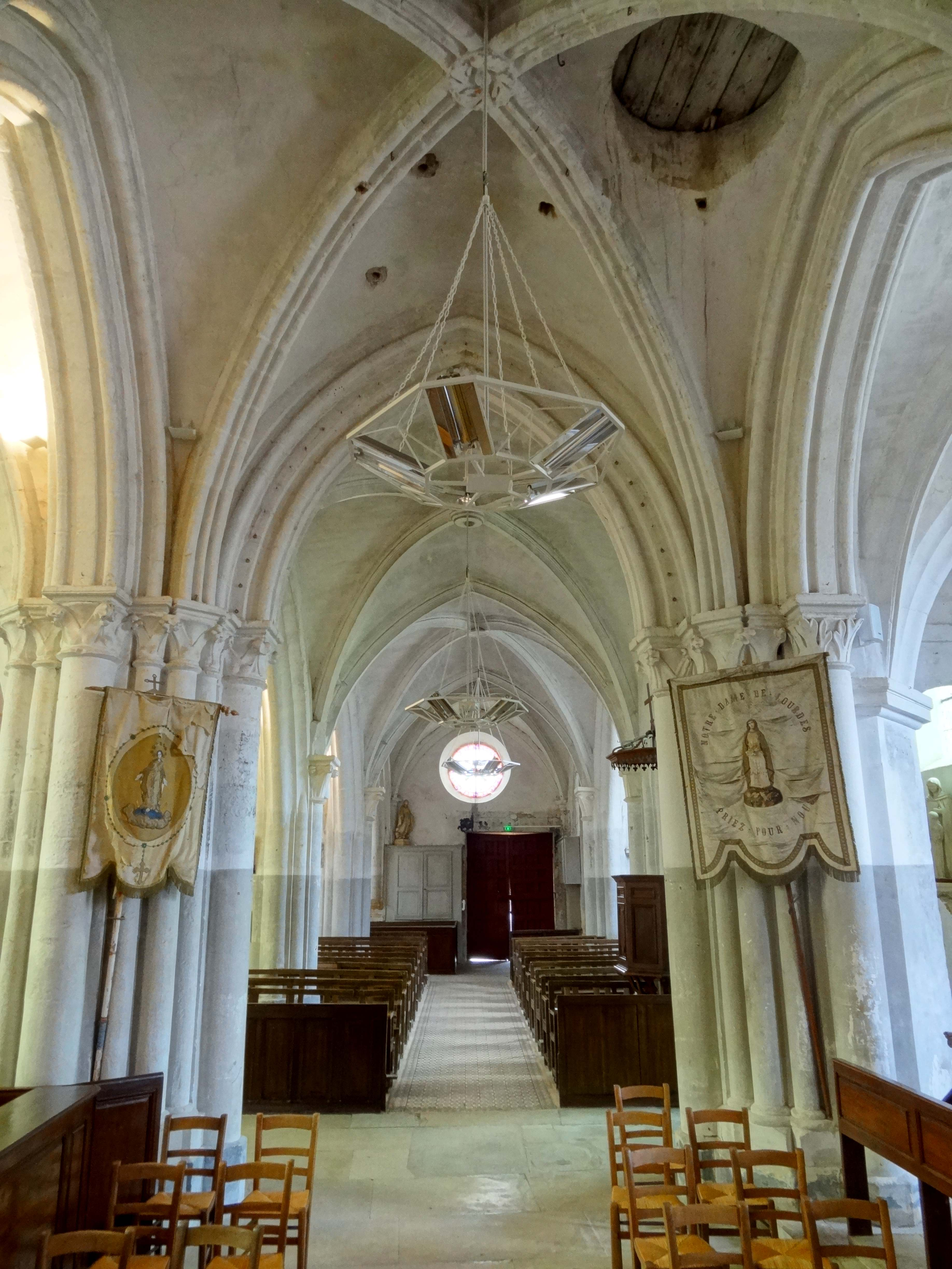 Intérieur de l'église - voir titre.